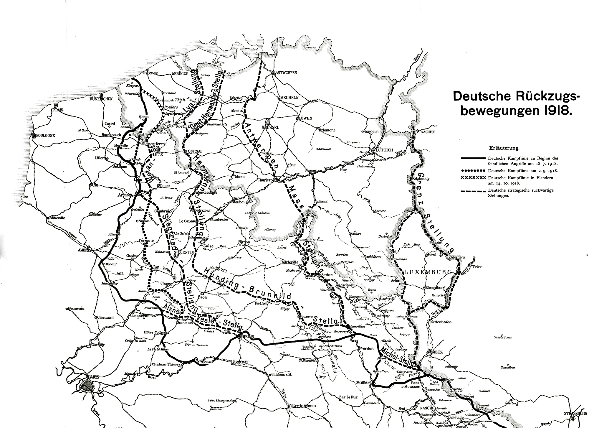 Lagekarte 1918 Rückzugsbewegungen